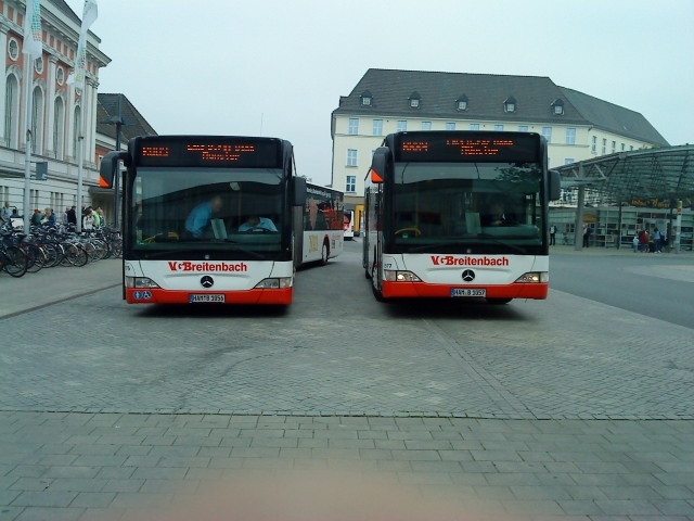 Schienenersatzverkehr der Verkehrsgesellschaft Breitenbach im Auftrag der Euro Bahn